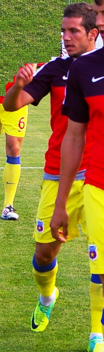 Alexandru Chipciu ist eine Spieler von Steaua Bukarest